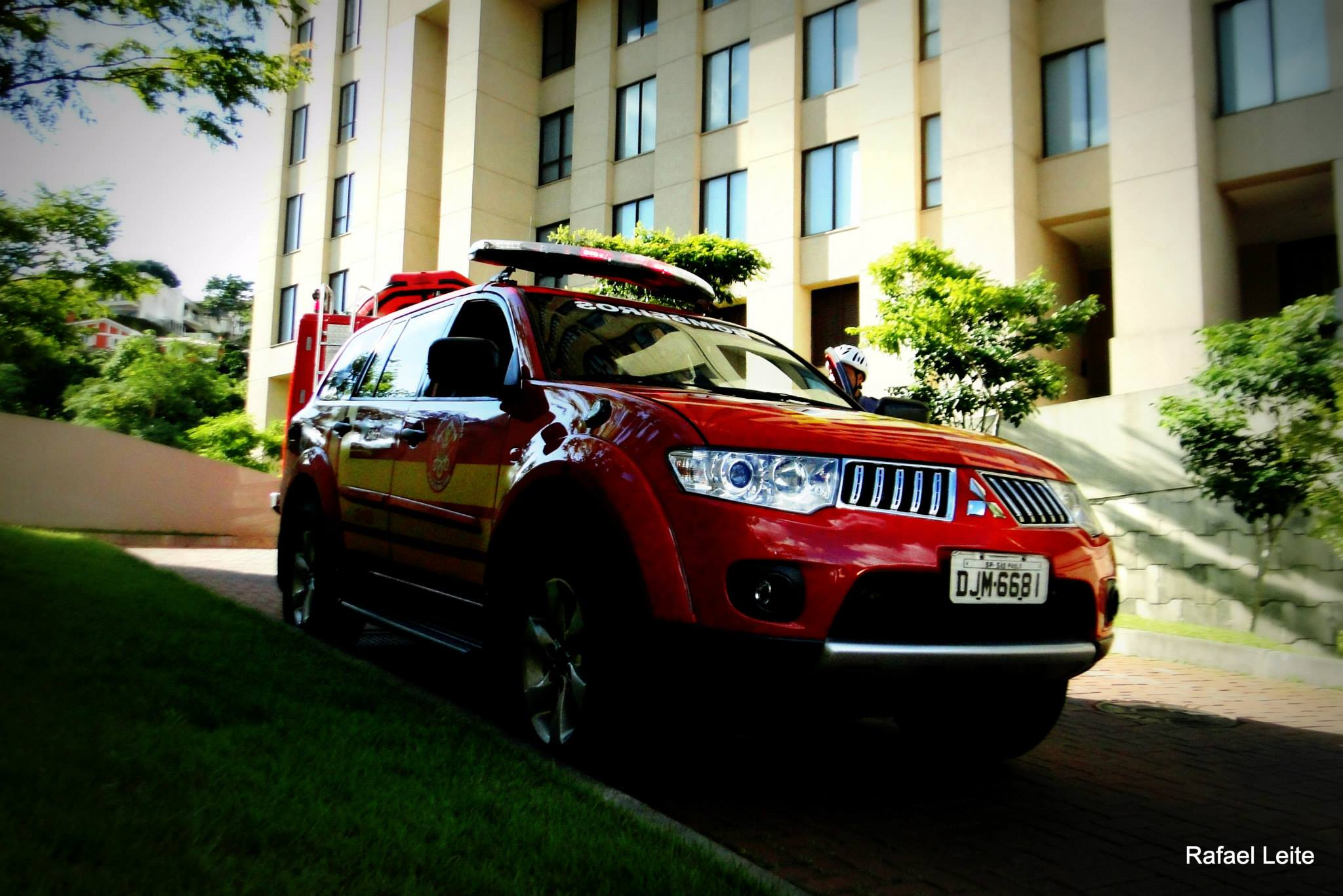 Unidade de Suporte Avançado do PB Butantã